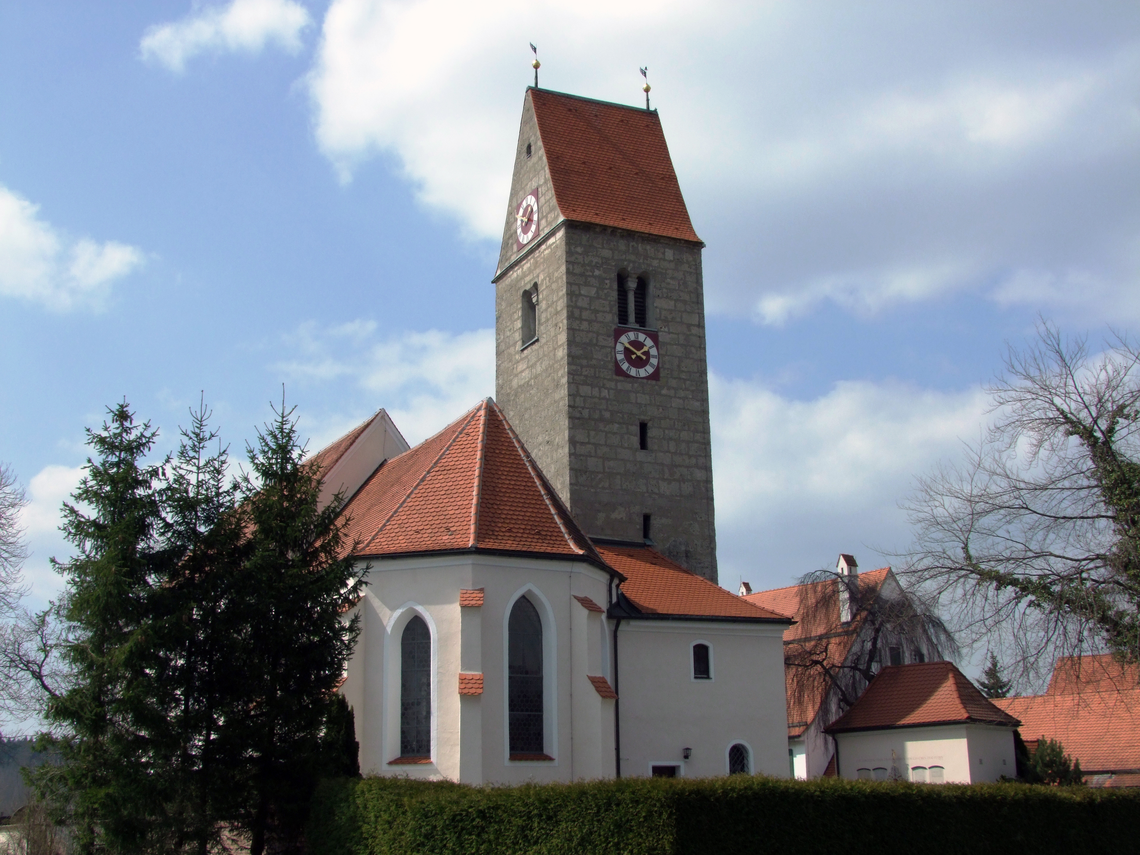 Mariä Himmelfahrt, Pfarrkirche im oberschwäbischen Illerbeuren bei Memmingen